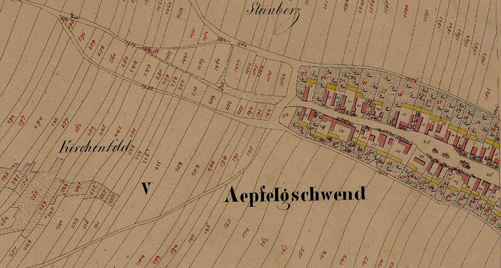 Ausschnitt des Franziszeischen Katasters 1823 im Bereich des ehemaligen Dorfes Äpfelgschwendt, Gemeinde Göpfritz an der Wild, Niederösterreich